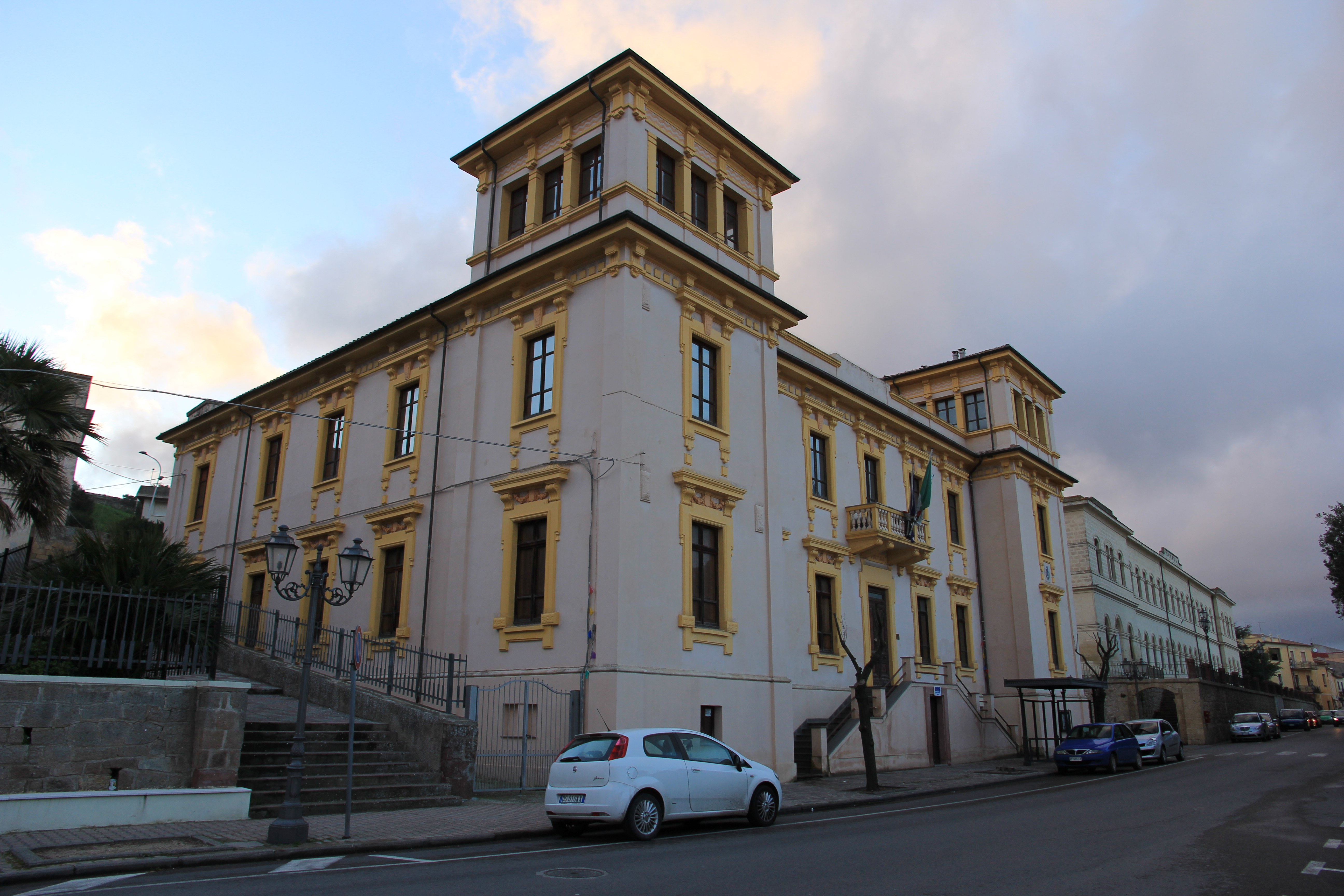 Nulvi - Il comune